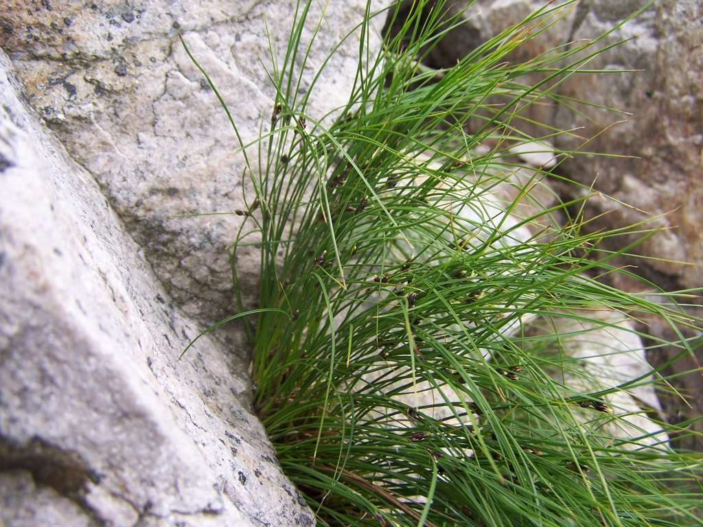 Juncus trifidus (pl. sit skucina), habitat: Tatra Mountains, Ornak